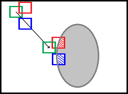 Représentation de l'algorithme patch match (utilisé en inpainting)